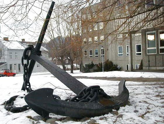 Ankeret forran rådhuset i Hønefoss